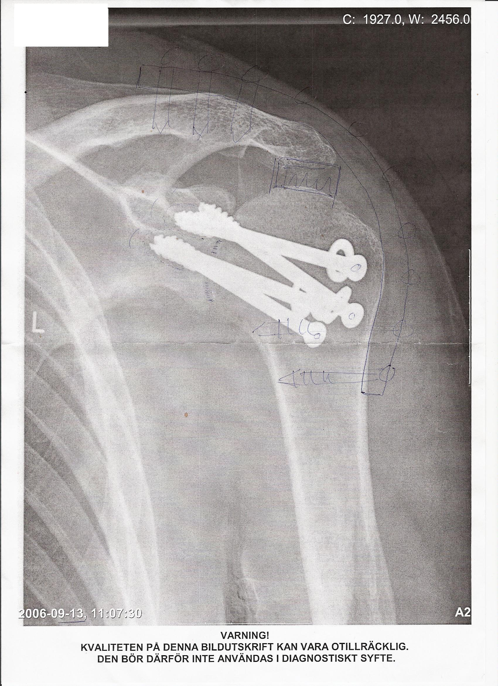 Exempel på utförd artrodes på vänster axel. Axeln tillhör Johan S 18:28, 30 November 2006 (UTC)